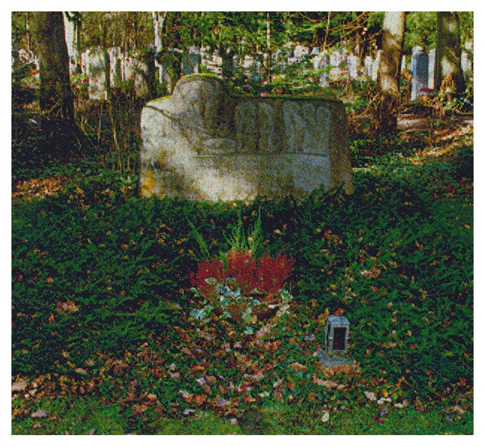 Waldfriedhof München-Will Dohm